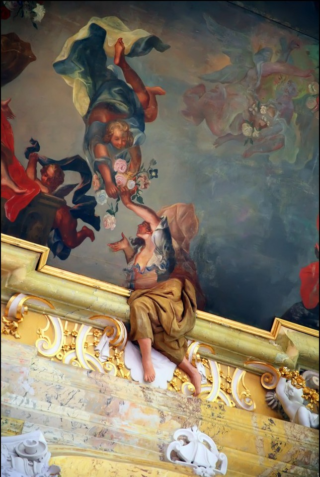 Illusionistischer Übergang zwischen Deckengemälde und Gesimsstuck im Fürstensaal von Leubus.